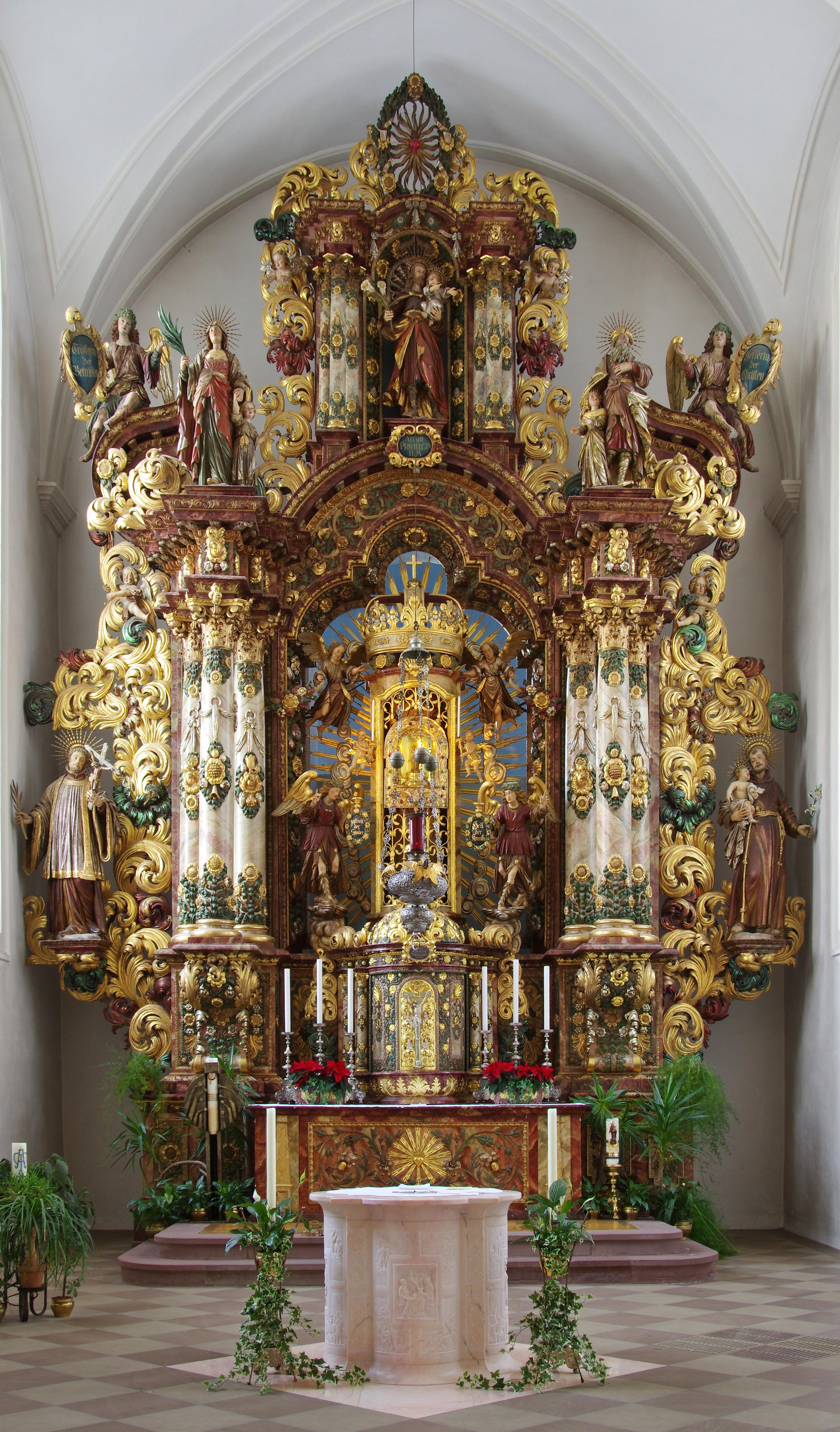 Bilder der Wallfahrtskirche "Maria in der Tanne" in Triberg Schwarzwald